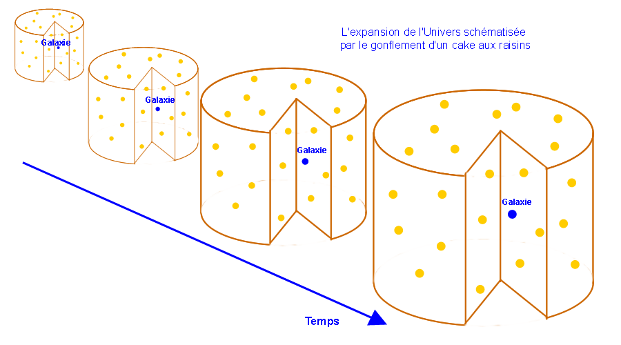 Expansion de l'univers imagée.